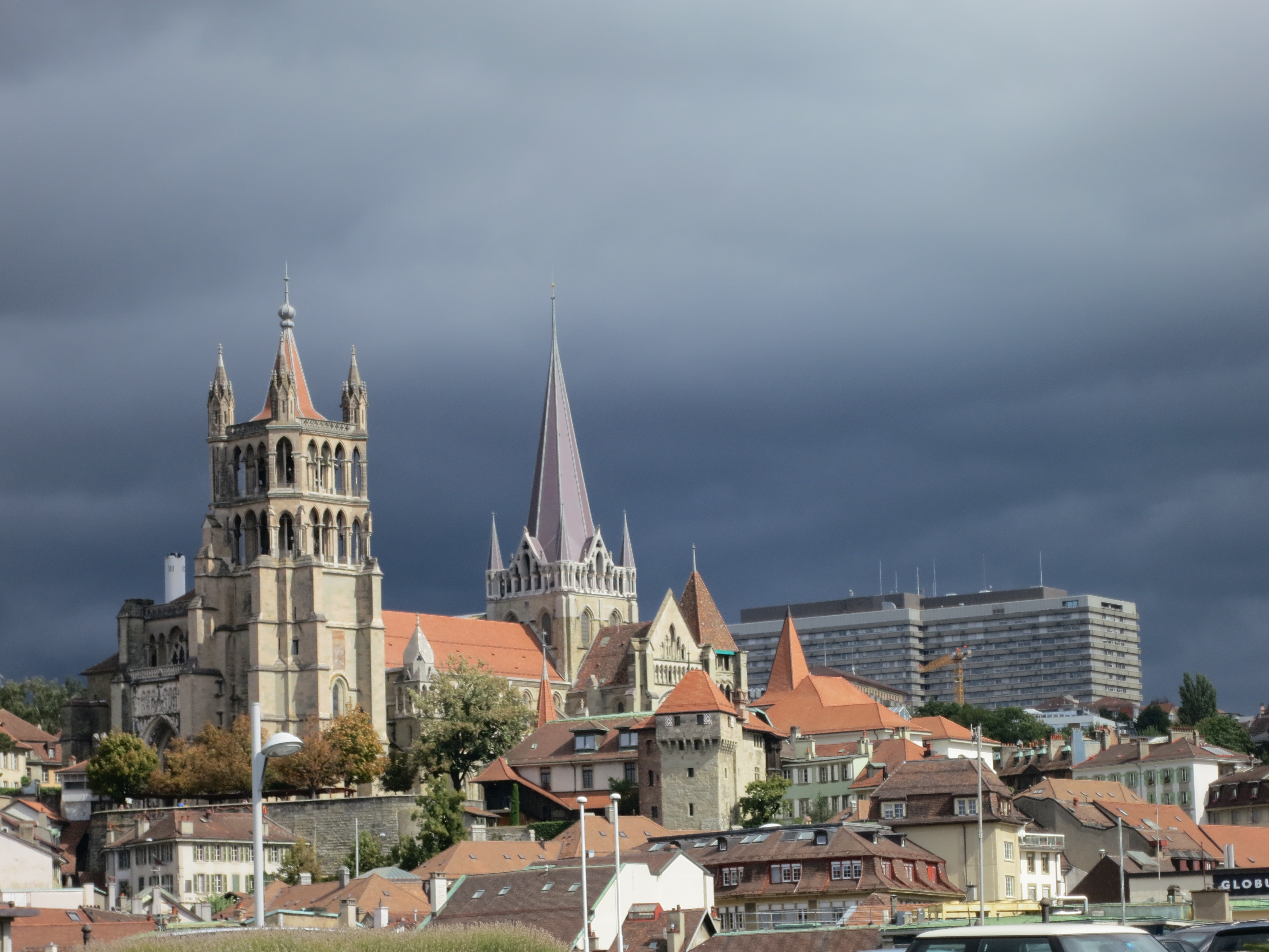 Colline de la Cité (latènezeitliche/ mittelalterliche Siedlung)